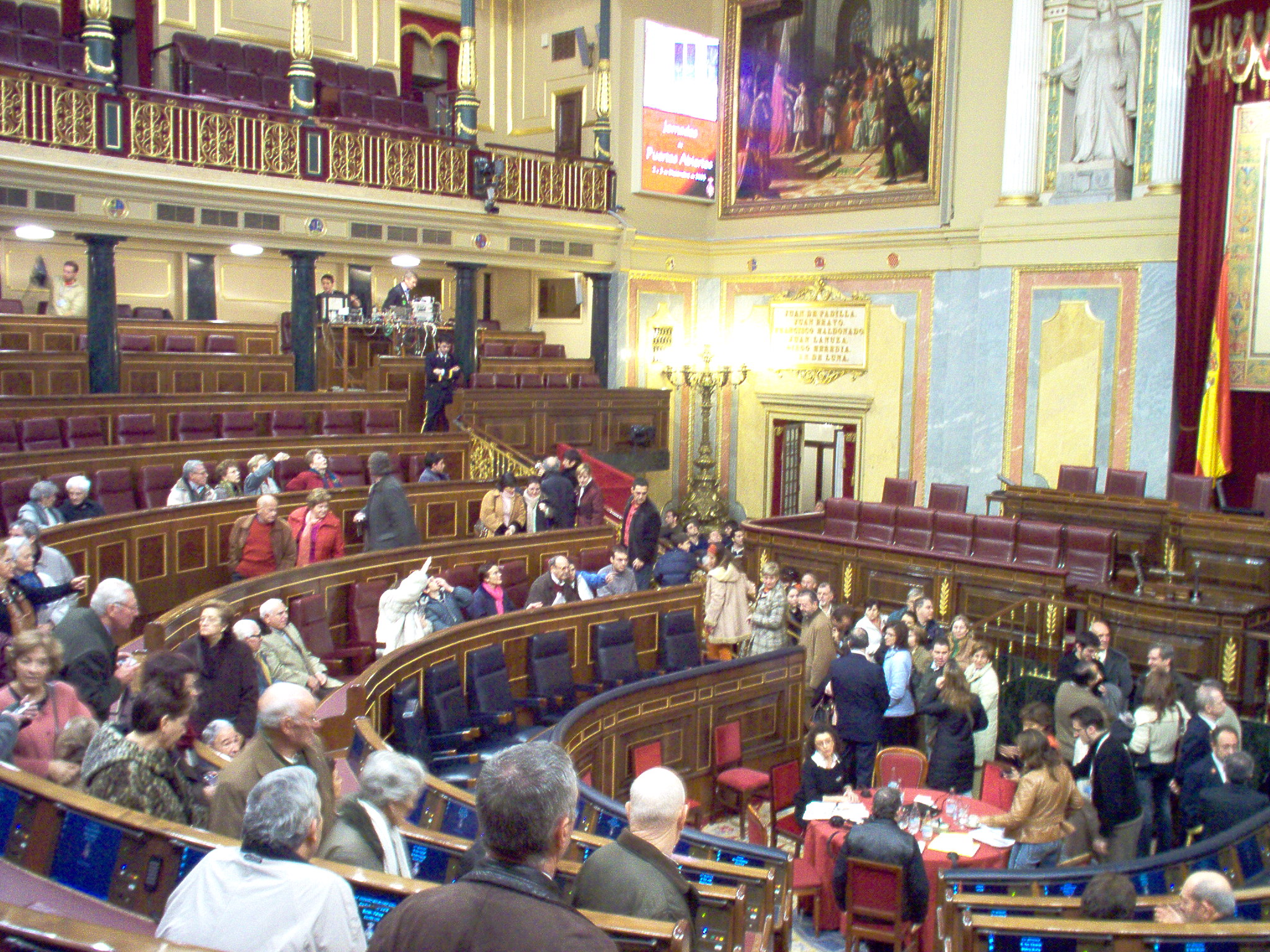 Imagen del Congreso de los Diputados en la jornada de puertas abiertas, diciembre 2005.